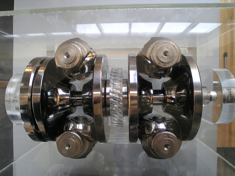 エクストロイドCVT内部構成